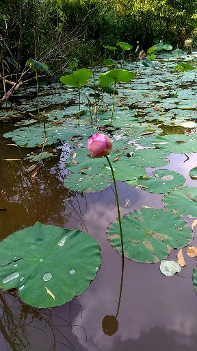 sen